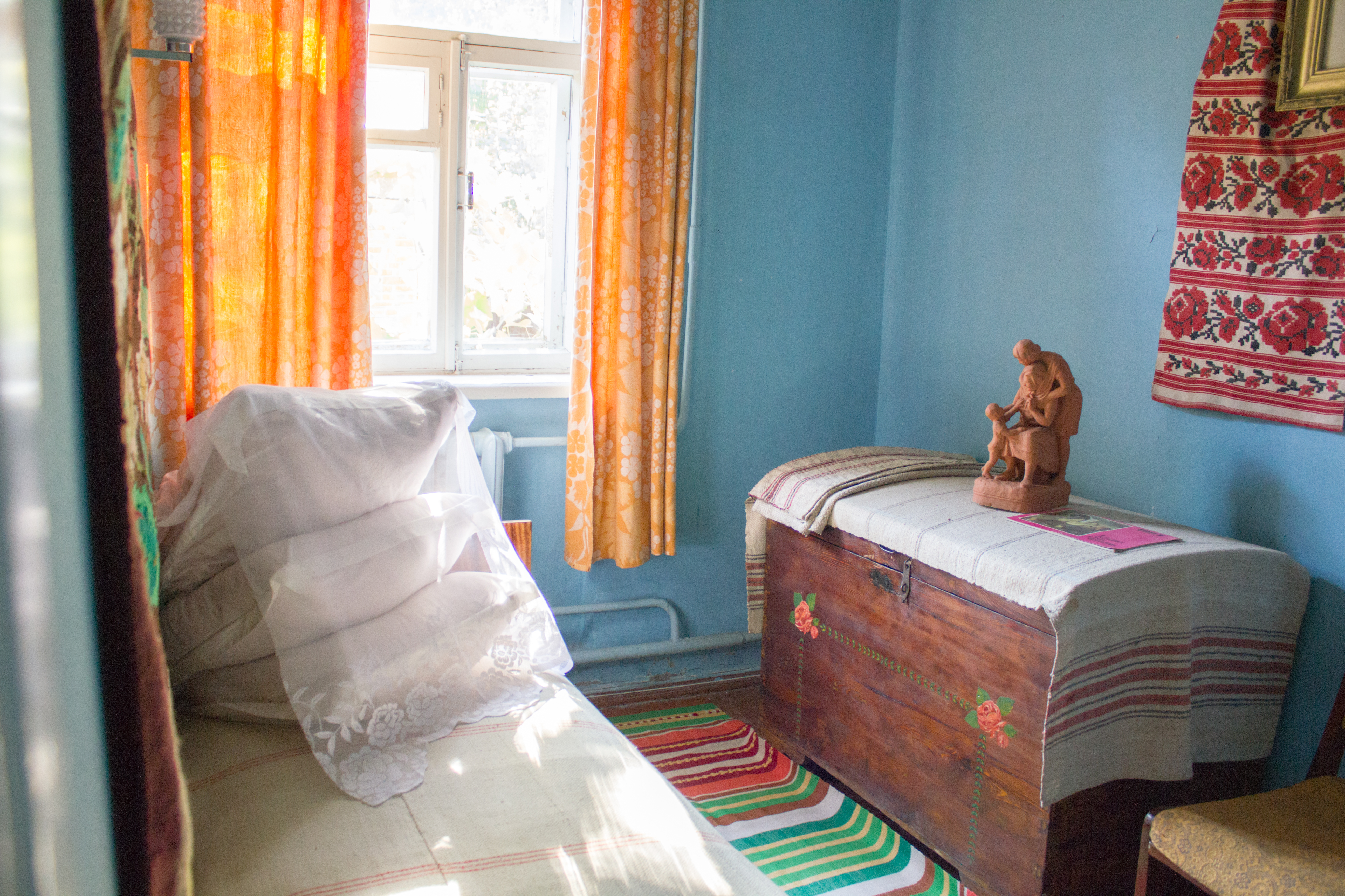 Зона «Українське село 1960–1970-х років», Київ, Національний музей народної архітектури і побуту України, Пирогів